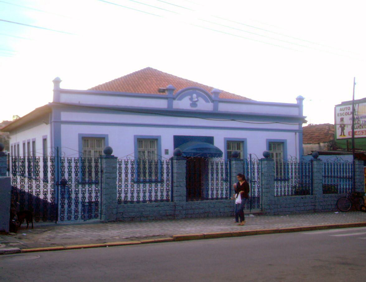 Escola Municipal de Educação Infantil Padre Eustáquio, em Poá, São Paulo.